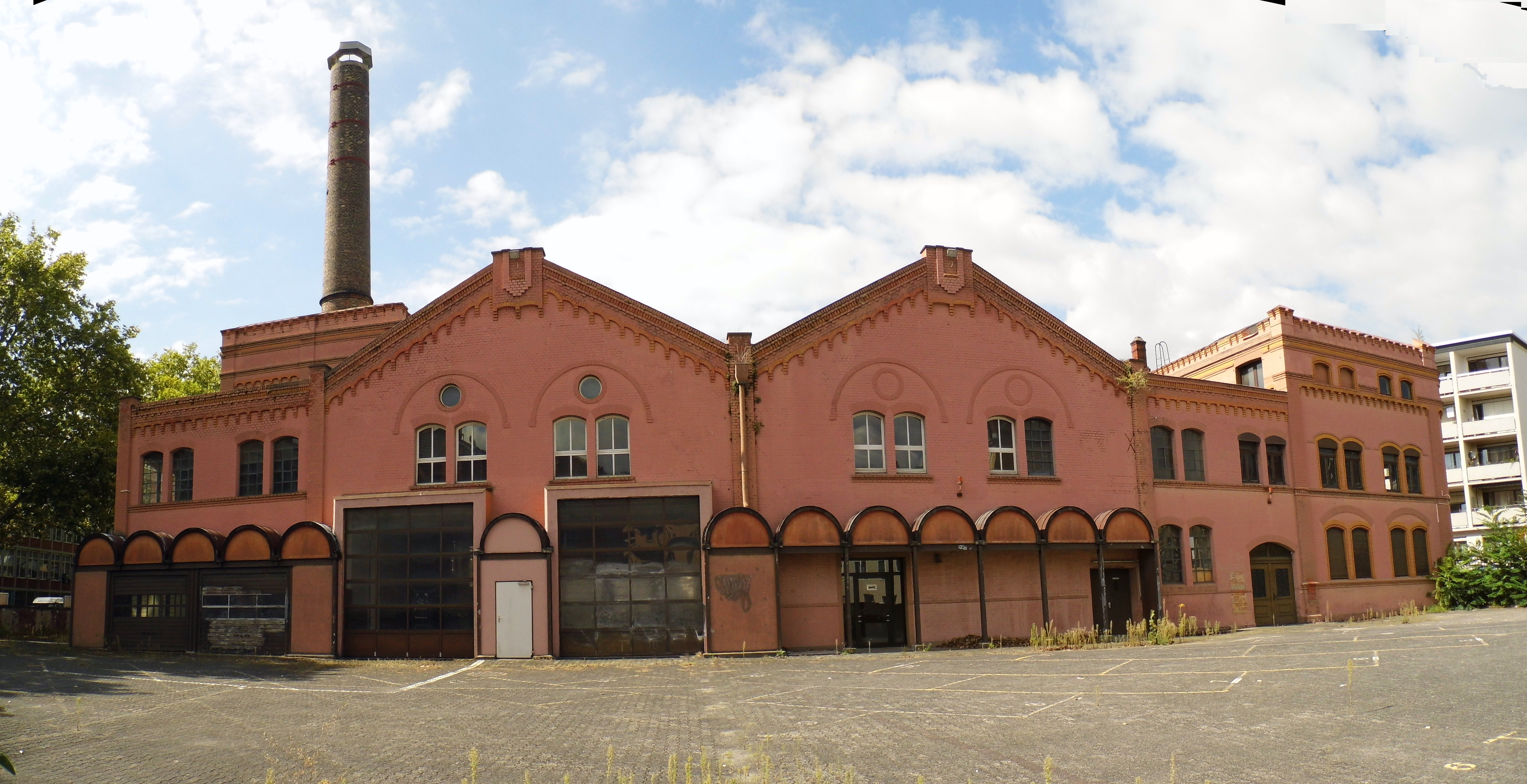 Frankfurt, Bockenheim, E-Werk, Front. Der heute unter Denkmalschutz stehende gelbe Klinkerbau mit roten Lisenen und abgesetzten Blendbögen wurde bereits 1892 an der Kuhwaldstraße errichtet, um mit dem Elektrizitätswerk den rasant anwachsenden Energiebedarf der rasch wachsenden Industrie von Bockenheim, speziell an der Solmsstraße zu decken. Das E-Werk befindet sich hinter einer symmetrischen Giebelfassade an der Kuhwaldstraße, während sich das ehemalige Verwaltungsgebäude und die Kondensationsanlage mit ihrer turmartigen Ausführung an der Ohmstraße befinden. Der Kamin wurde auf einen kunstvoll gemauerten Sockel errichtet. Bauherr dieses ersten Elektrizitätswerkes im heutigen Stadtgebiet von Frankfurt-Bockenheim war Friedrich Wilhelm Lahmeyer (1859-1907), ein deutscher Elektroindustrieller. Sein Unternehmen wurde im gleichen Jahr in eine Aktiengesellschaft umgewandelt. Die Elektrizitäts-AG vormals W. Lahmeyer & Co. (EAG) bestand als ein Unternehmen der Elektroindustrie mit Sitz in Frankfurt am Main bis ins Jahr 2000. Dann verschmolz die Lahmeyer AG endgültig mit ihrer Mutter RWE und die Firma Lahmeyer AG erlosch. Der Name Lahmeyer wird heute nur noch von der ehemaligen Tochter Lahmeyer Internationa weitergeführt. Das unter Denkmalschutz stehende Objekt ist schon länger funktionslos und leer. Eigner ist seit 1989 Bernd F. Lunkewitz, ein deutscher Immobilieninvestor und Verleger. Er hatte bereits den Frankfurter Architekten Christoph Mäckler mit einen, nicht realisierten, Entwurf eines Umbaus beauftragt. Zurzeit kann das Gebäude für Veranstaltungen gemietet werden.